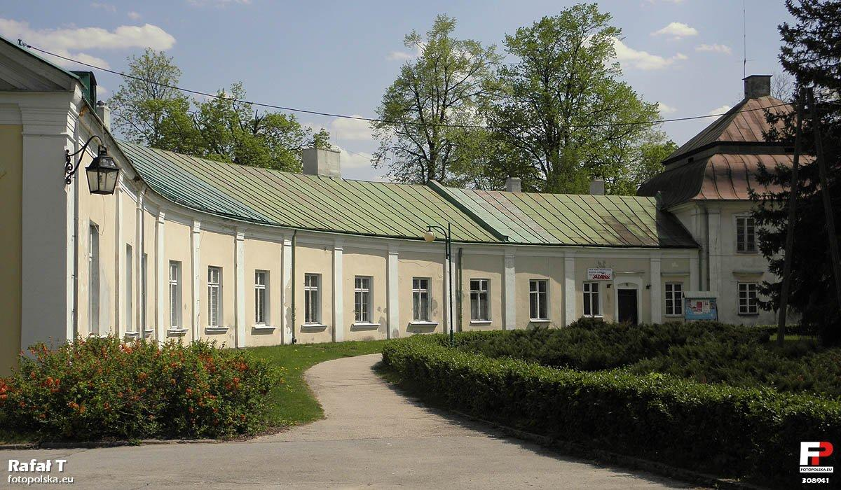 Wschodnie skrzydło pałacu.